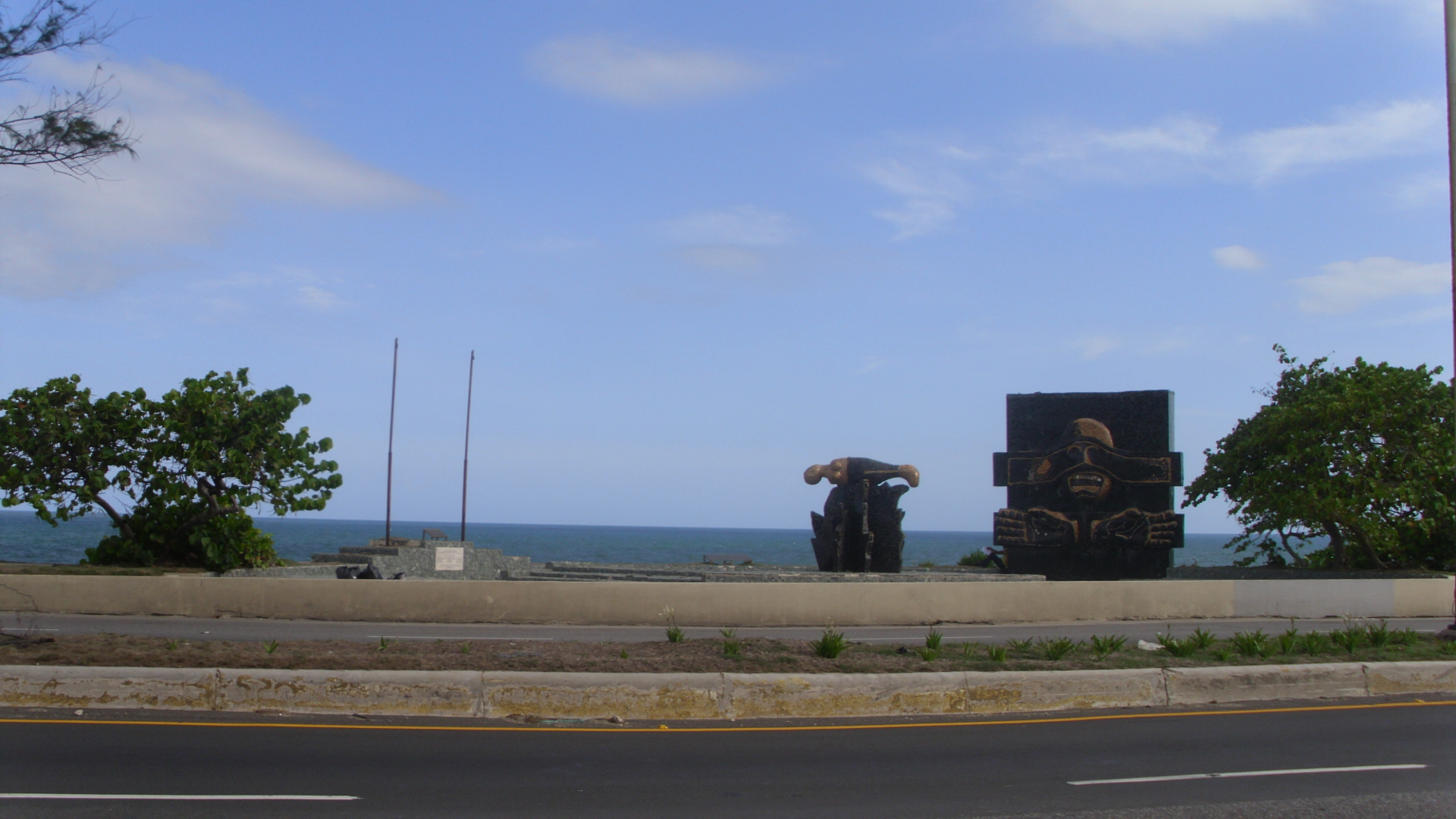 Monument ter nagedachtenis aan de slachtoffers van de Trujillodictatuur 1930-1961